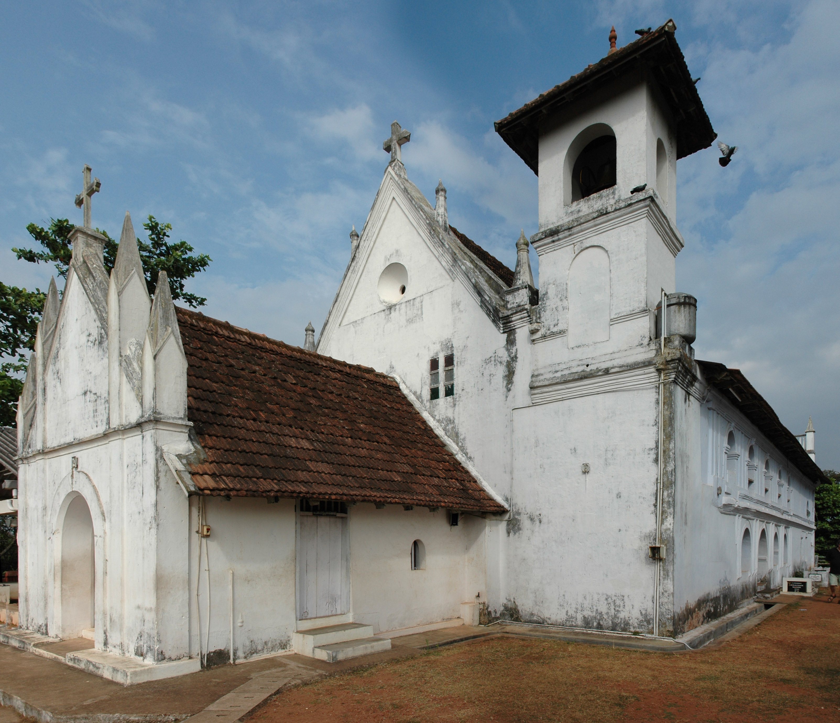 Kottayam Valiyapally (St. Mary's Knanaya Church) (Kerala, India)